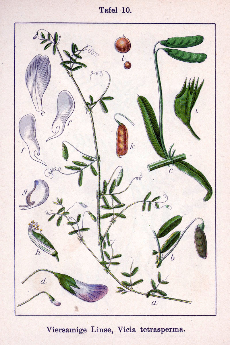 Vicia tetrasperma (L.) Schreb. Original Description Viersamige Linse, Vicia tetrasperma